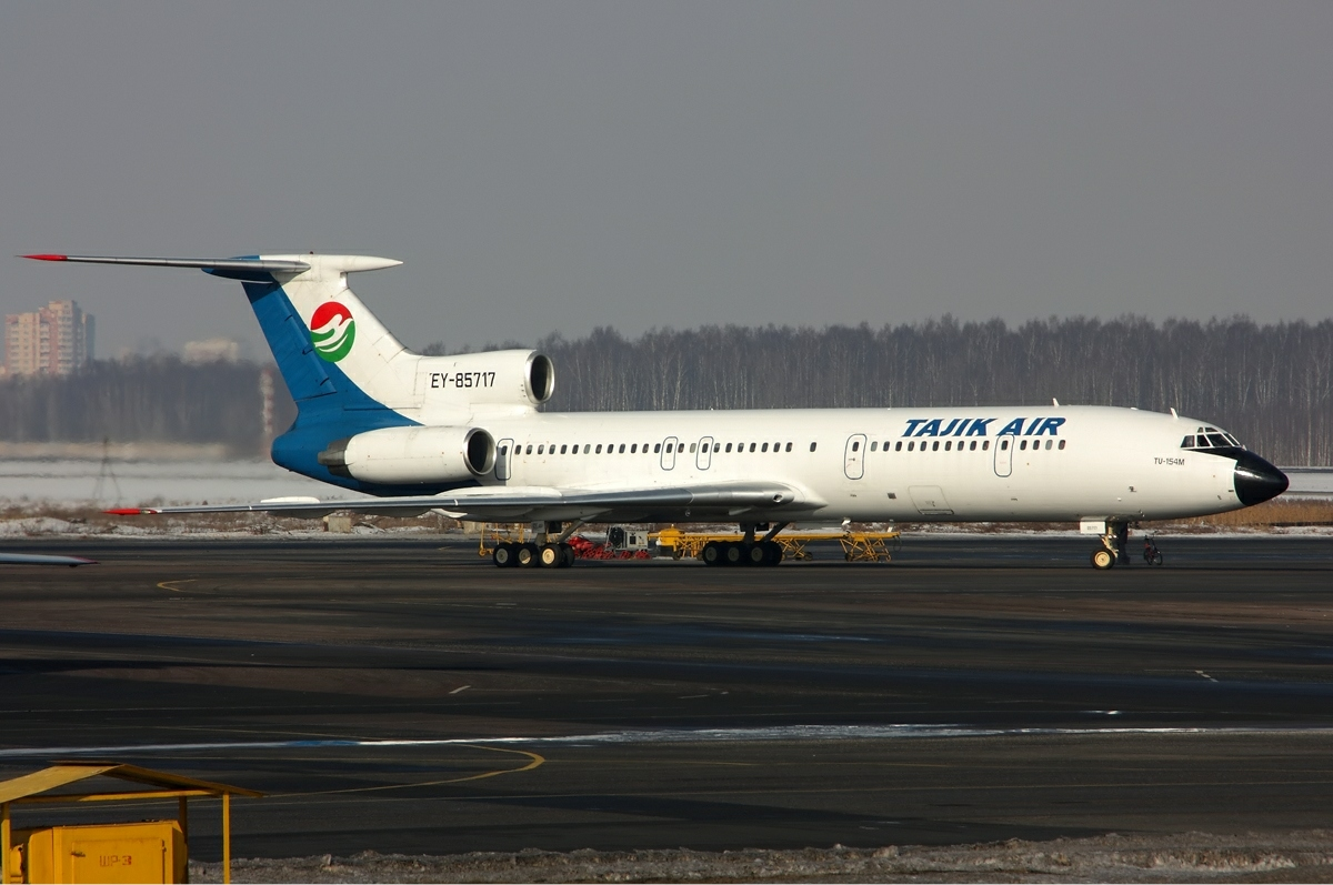 Tajik Air Tupolev Tu-154M